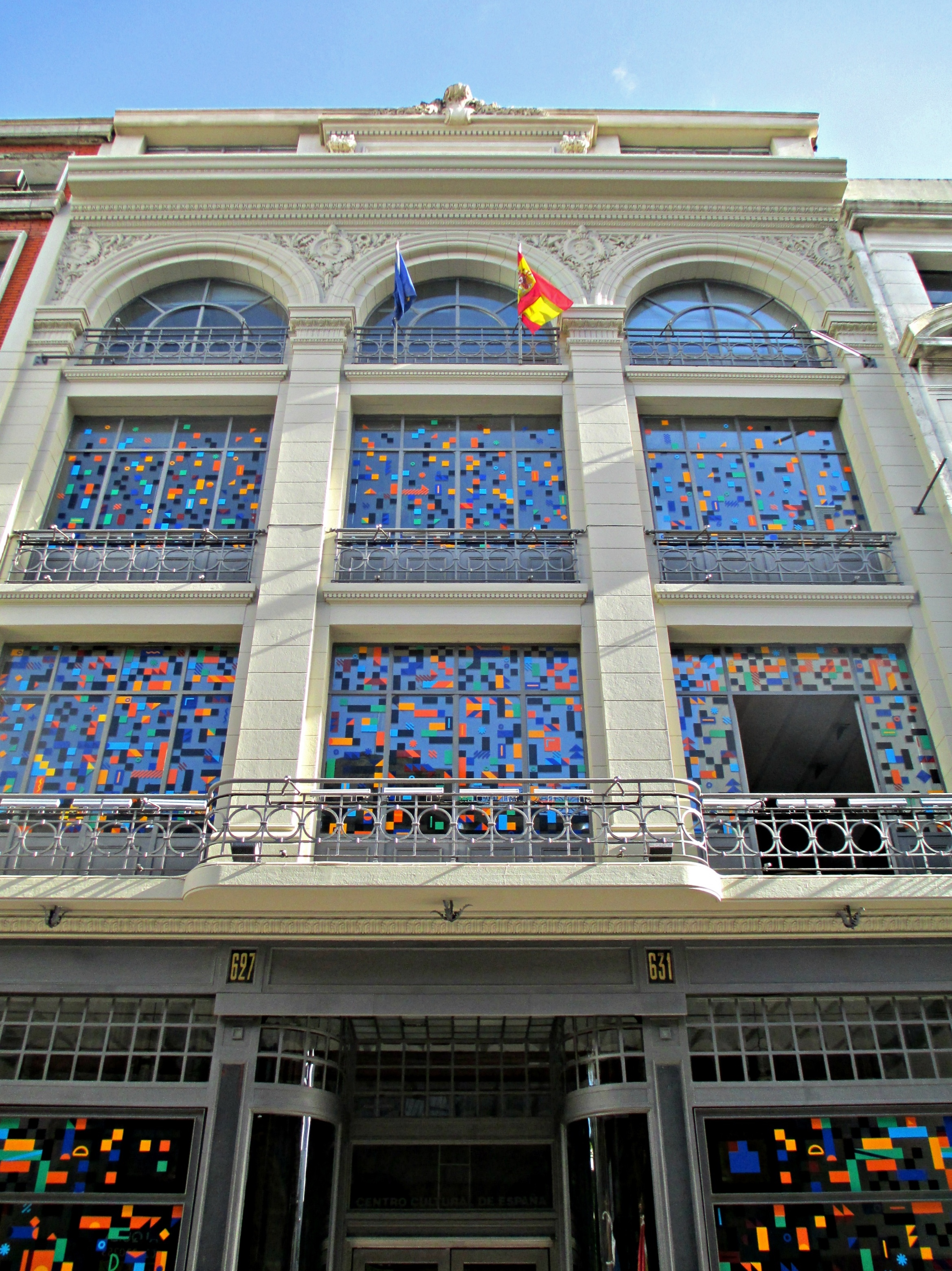 Centro Cultural de España (CCE-Montevideo) en Uruguay ; foto de marzo de 2013.